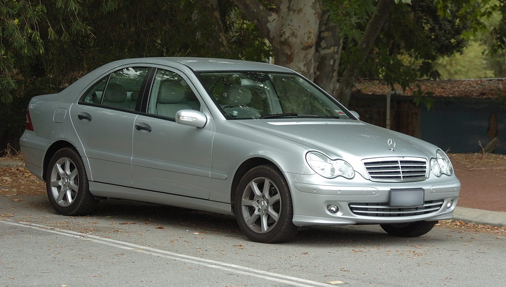 Mercedes Benz W203 sedan